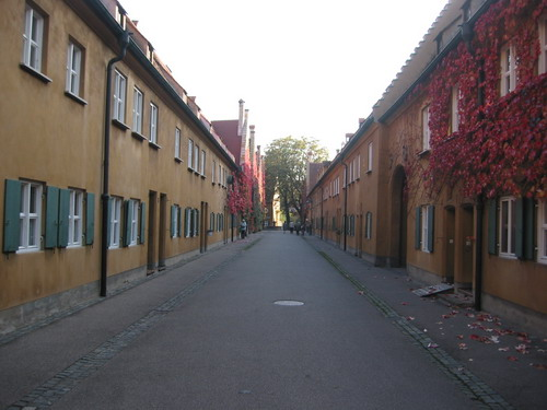 Fuggerei